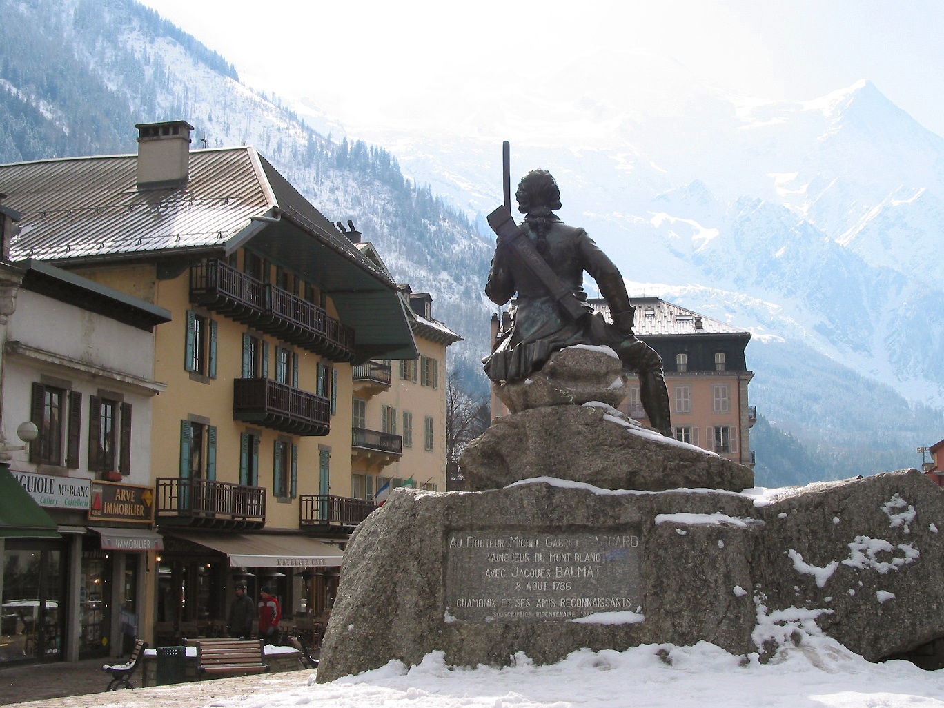 Chamonix-Mont-Blanc (Haute-Savoie - France), statue du médecin, et botaniste Michel Paccard observant le sommet du Mont Blanc (alpiniste ayant réussi la première ascencion du Mont Blanc avec le guide Jacques Balmat le 8 août 1786 à 18h23).